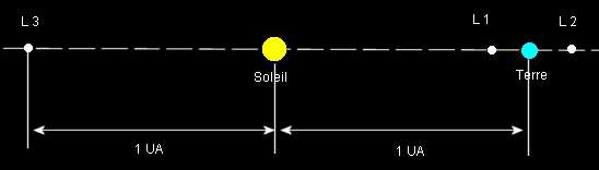 Trois des points de Lagrange sont situés sur l'axe reliant les deux corps. Dans le cas d'une grande dissymétrie de masse entre ceux-ci, deux points sont situés proches et de part et d'autre du corps peu massif, alors que le troisième est quasiment situé à l'opposé du corps peu massif par rapport au corps massif.